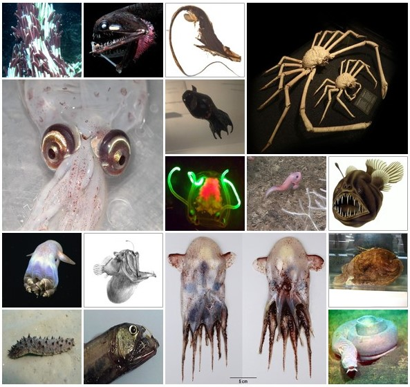 Mosaico de imágenes sobre Fauna abisal, a partir de varias imágenes en Wikimedia Commons.